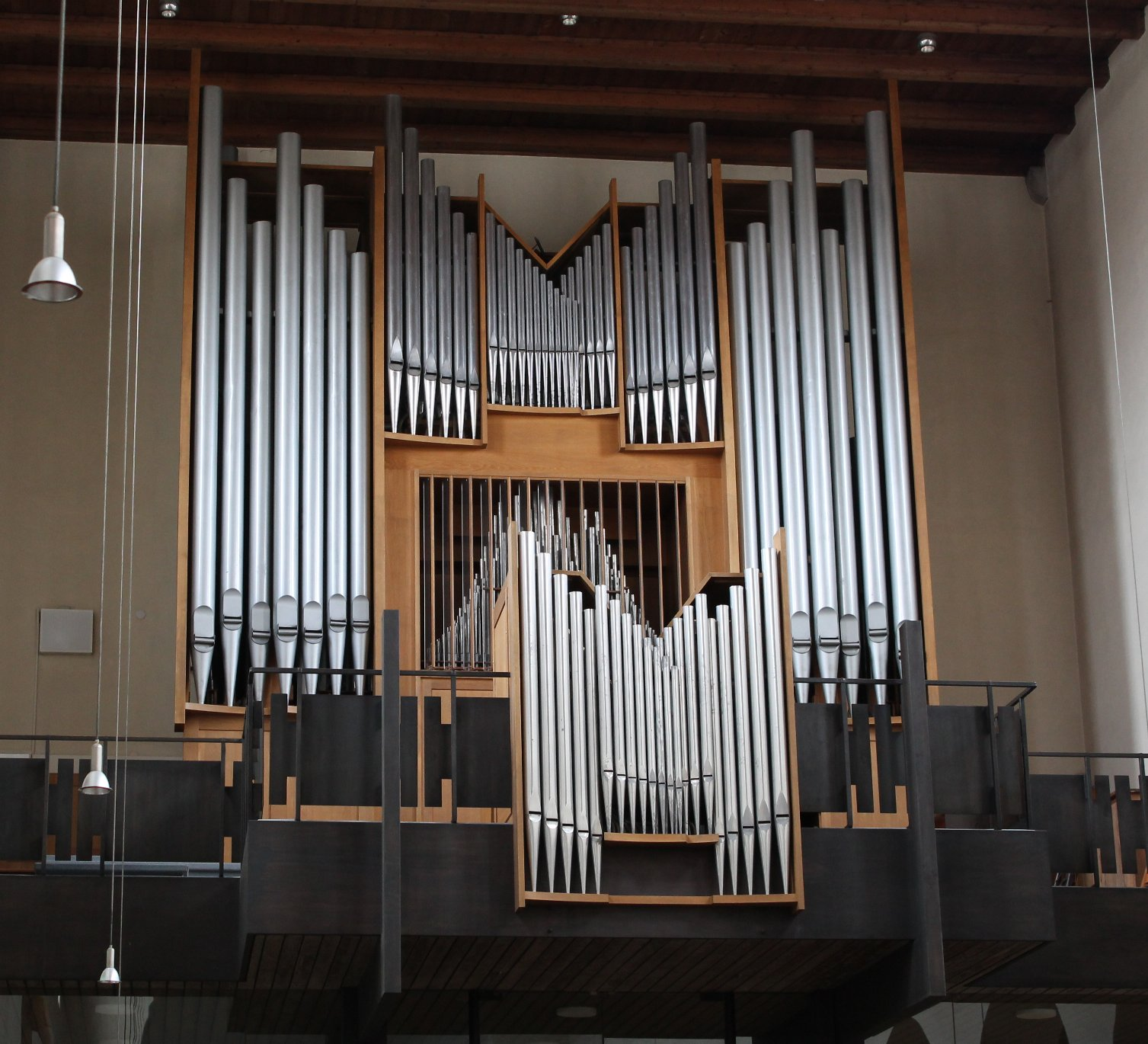 Orgel von St. Martin in München-Moosach (1975, Guido Nenninger, III/38)